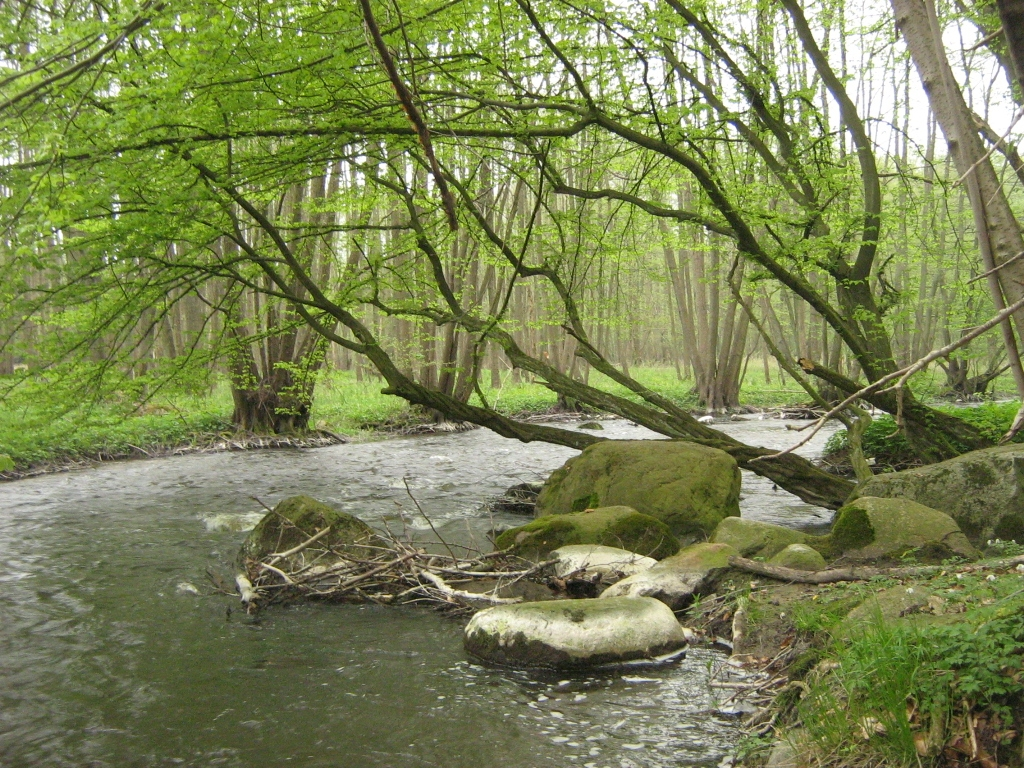 Die Ostpeene als Wildwasserbach im „Naturschutzgebiet Ostpeene“ zwischen Gielow und Malchin (Mecklenburg-Vorpommern)